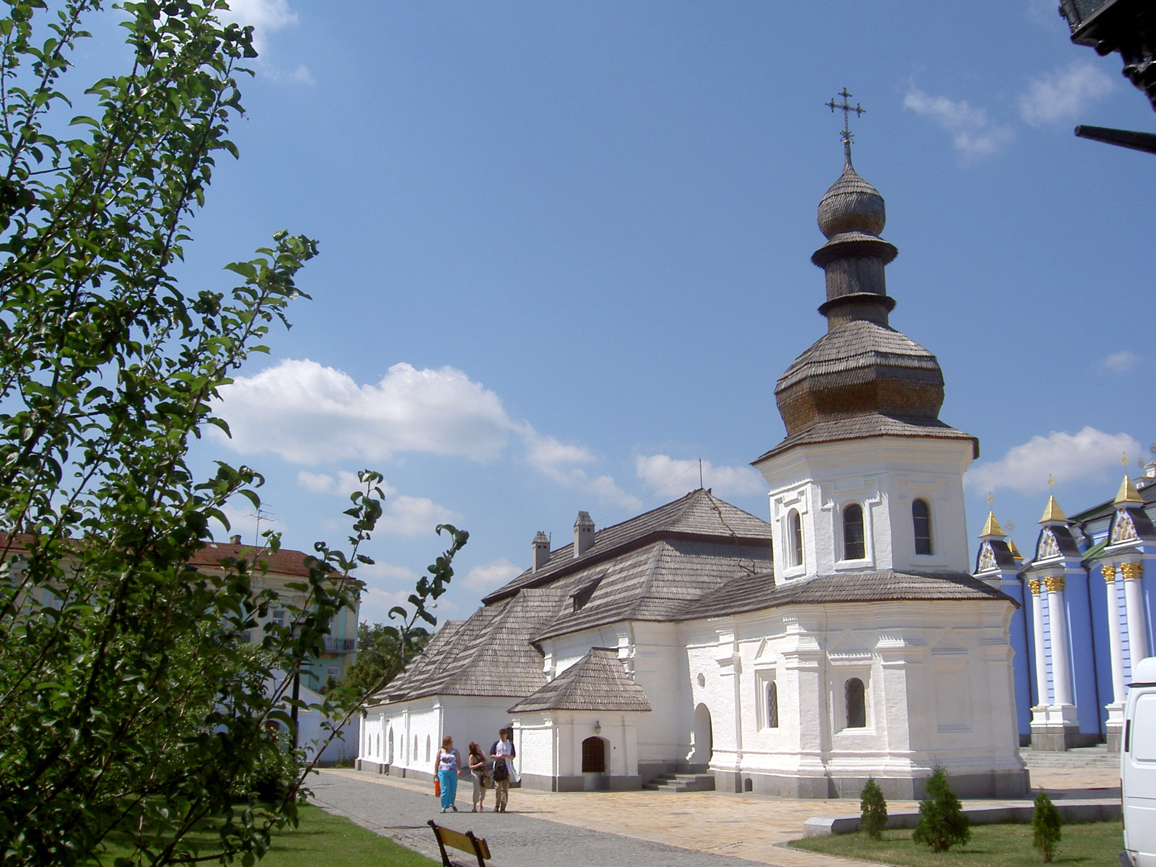 Kostel svatého Jana Křtitele